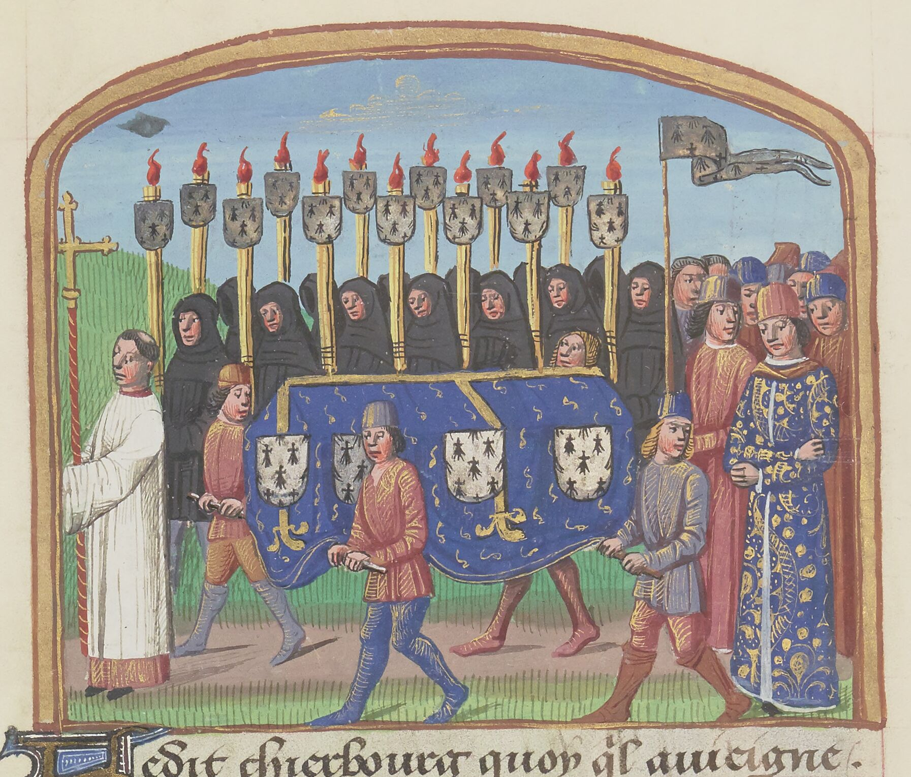 Les funérailles de François I°, par Martial d'Auvergne, enluminure issue de l'ouvrage Vigiles de Charles VII, Paris, France, XV°siècle.